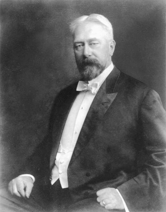 Gustav Lindenthal aus Brünn/Mähren 59jährig in der Zeit, als er den Bau der Queensboro-Brücke geleitet hat Sonstiges: Ein höher auflösendes .tiff-Bild findet sich auf